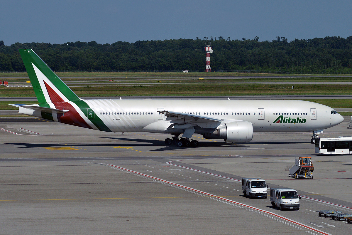 Alitalia, EI-DBK, Boeing 777-243 ER